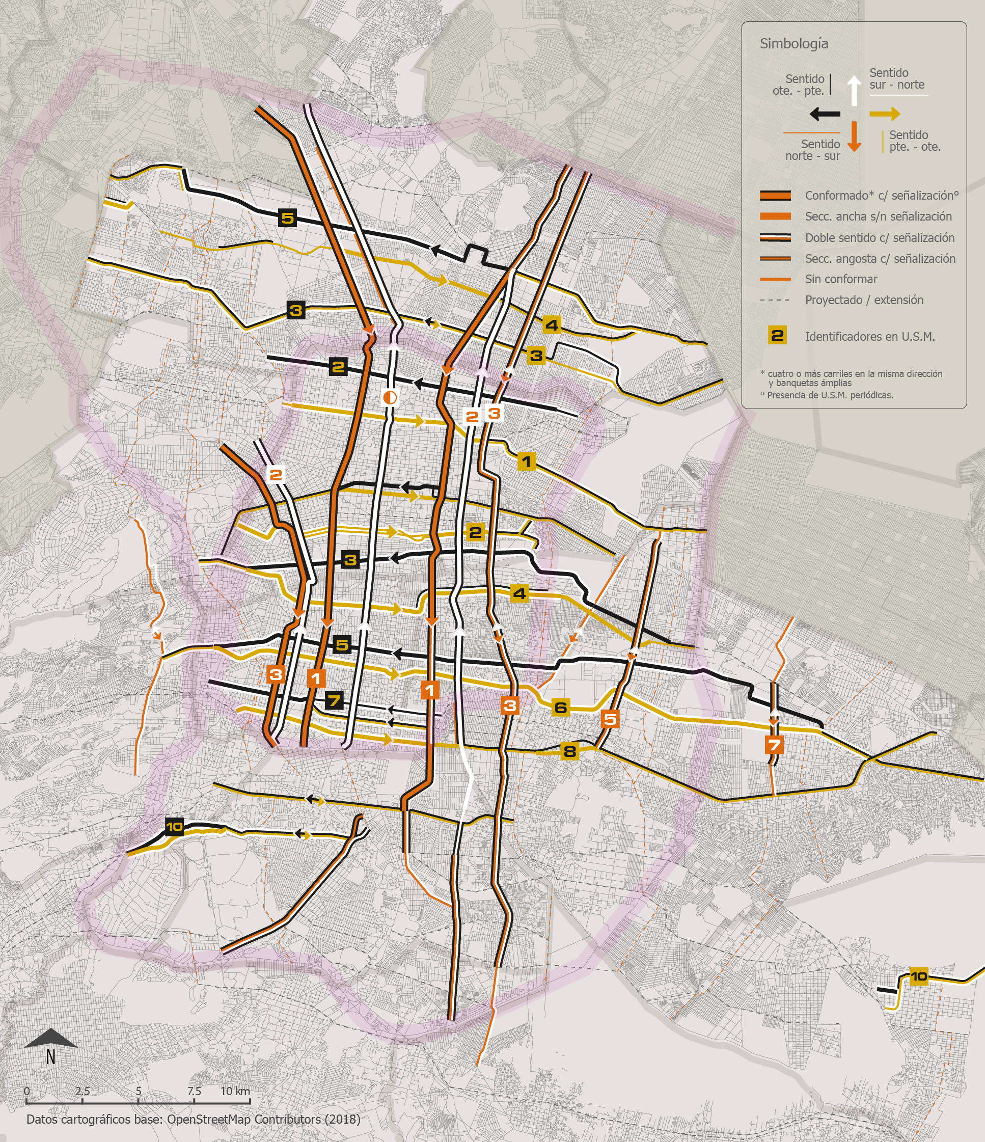 Estado actual de ejes viales, mostrando tramos inconclusos y parcialmente conformados.